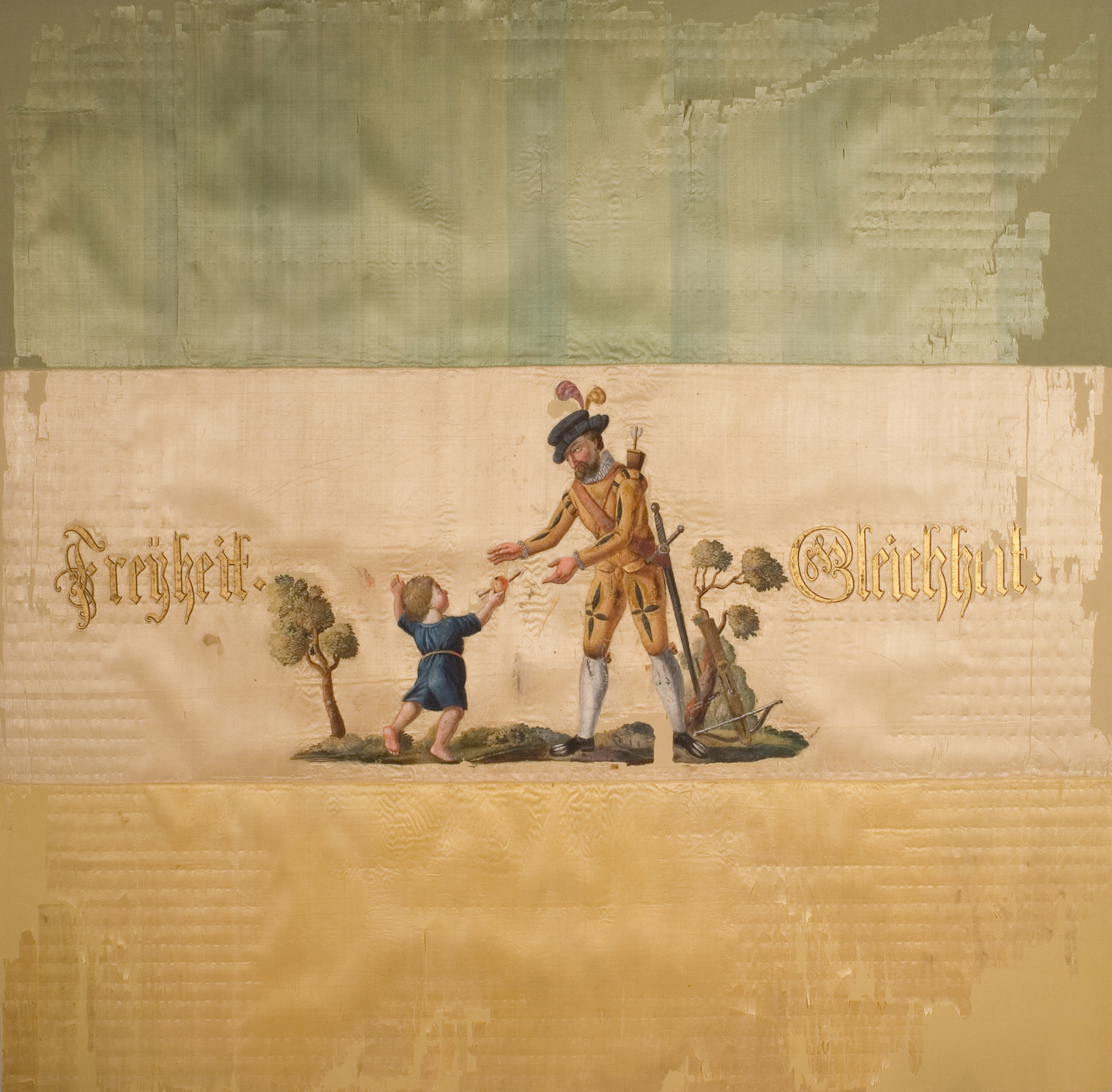 Grünrotgoldene Trikolore der Helvetischen Republik (1798–1803) mit dem Emblem Wilhelm Tell und der Devise "Freÿheit, Gleichheit". Geschenk Heinrich Zschokkes (1771–1848) an den Distrikt Stans, 1799. Bemalte Seide, 1,8 x 1,8 m. Sammlung Nidwaldner Museum, Stans.